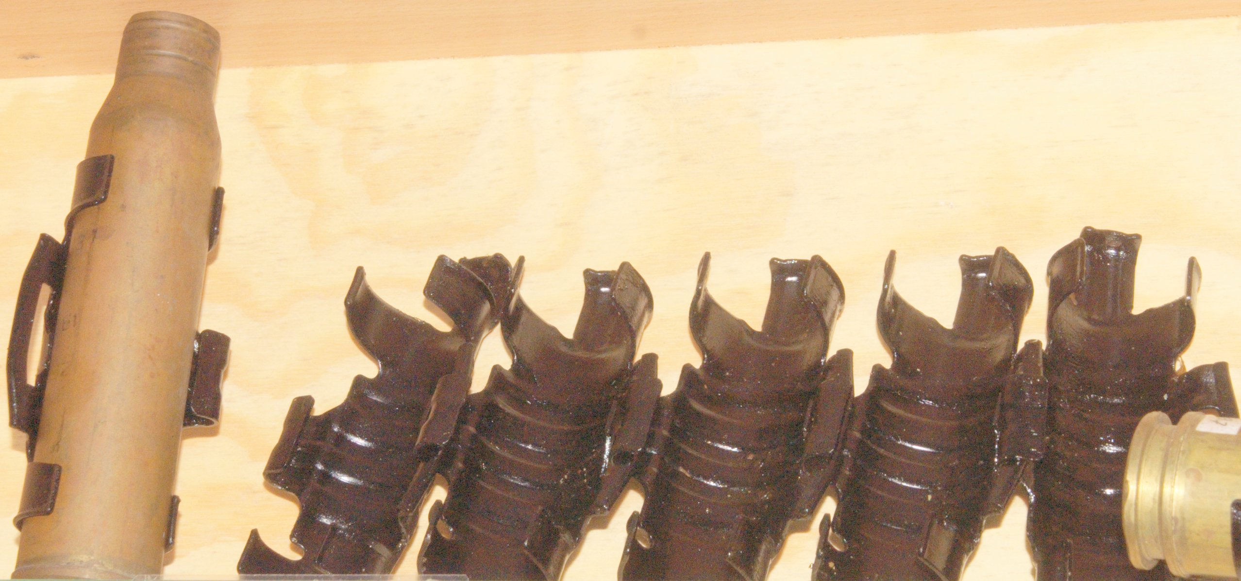 Tasma i luska do AK-230 z helskich ścigaczy okrętów podwodnych.